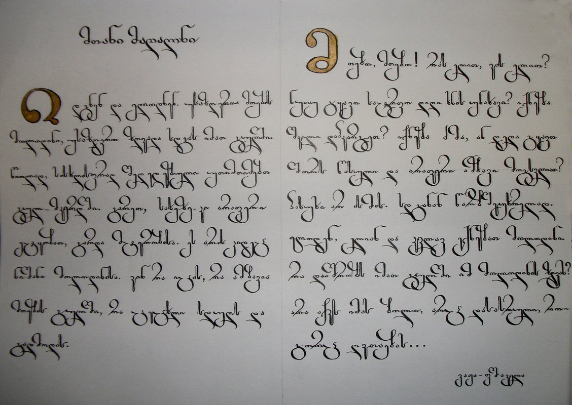 ოთარ ჯოლიას ნამუშევარი, ქართული კალიგრაფიის კონკურსი 2011